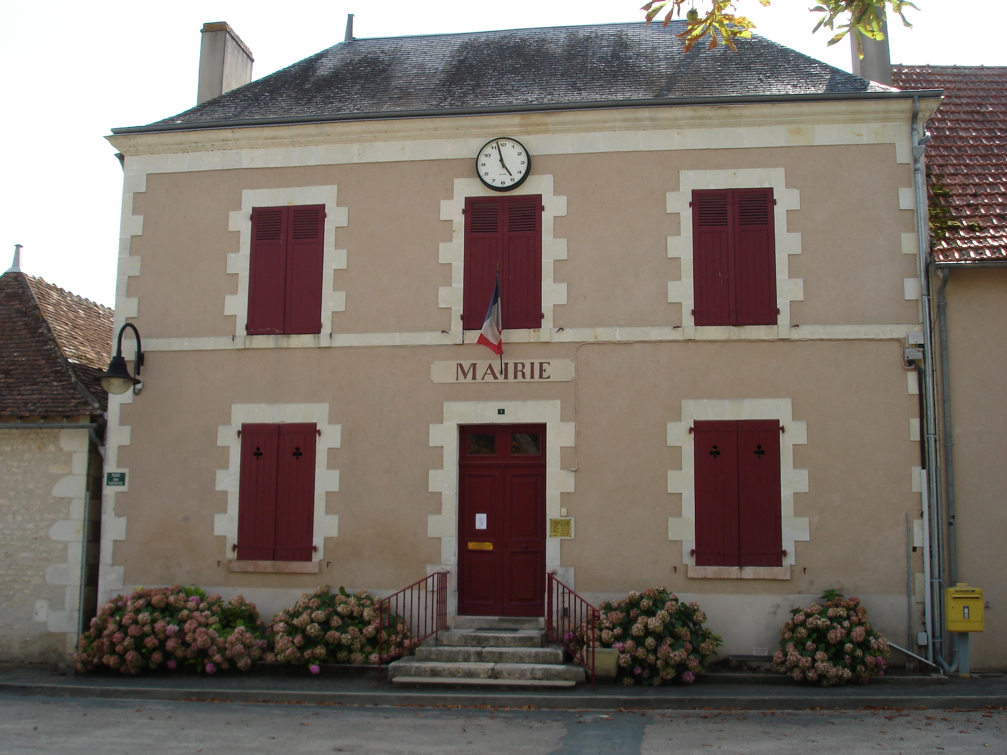 Néons-sur-Creuse (36) : La mairie.